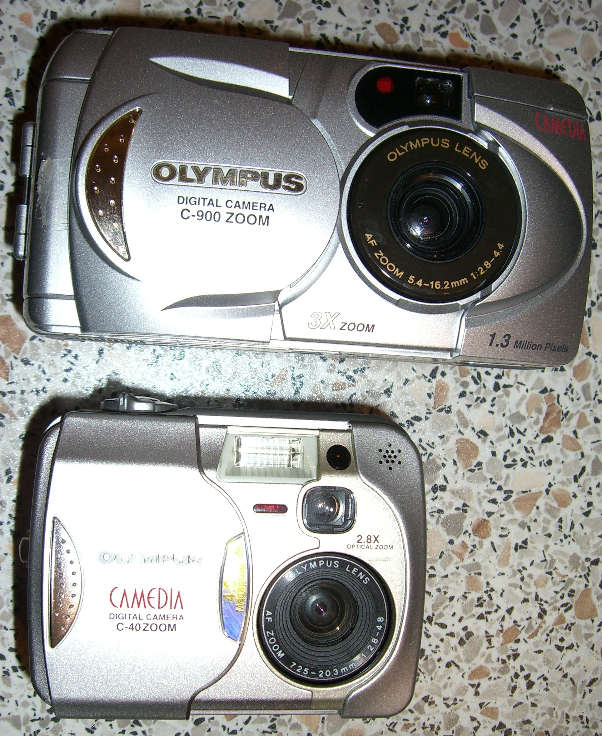 Olympus Camedia C900 von 1998 und C40 von 2002 im Vergleich